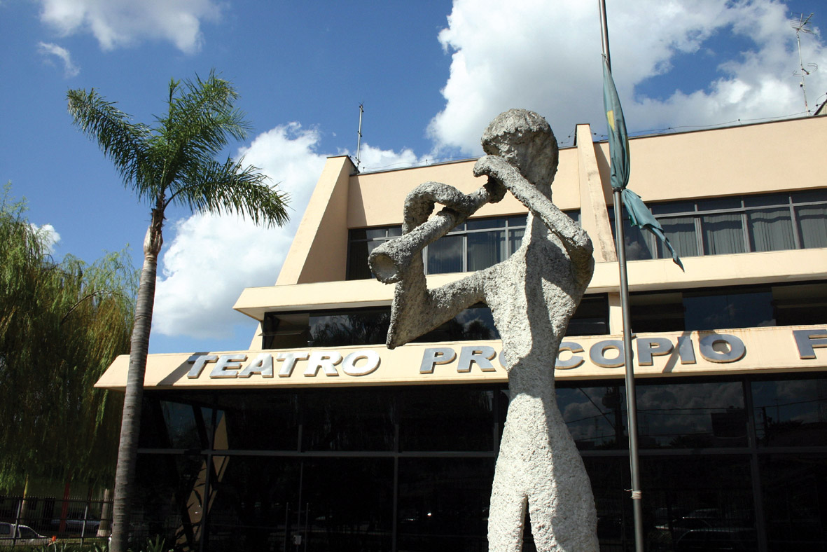 Foto do Teatro "Procópio Ferreira" (Conservatório Dramático e Musical "Dr. Carlos de Campos" de Tatuí)